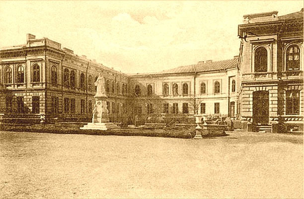 Palatul de langa Biserica Domnita Balasa, folosit ca azil